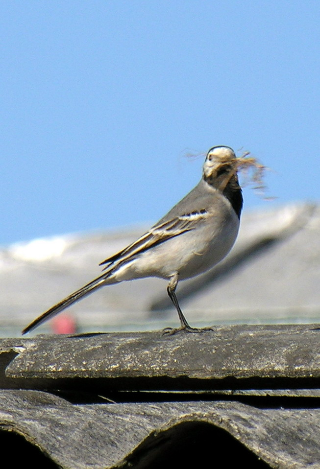 Baltoji kielė (Motacilla alba)